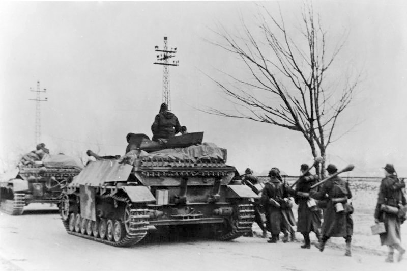 Dem Ansturm des Feindes entgegen Gegen den Druck der Sowjets an der ungarischen Front treten die deutschen Verbände immer wieder zu erfolgreichem Angriff an. [Jagdpanzer IV] und Grenadiere, die Panzerfaust über der Schulter, sind auf dem Marsch zur vordersten Linie. 1944 Foto: PK-Krumme PK-H 6851